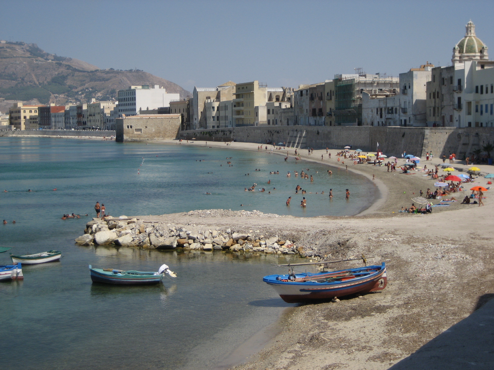 Mura di Tramontana e spaiggia - centro storico